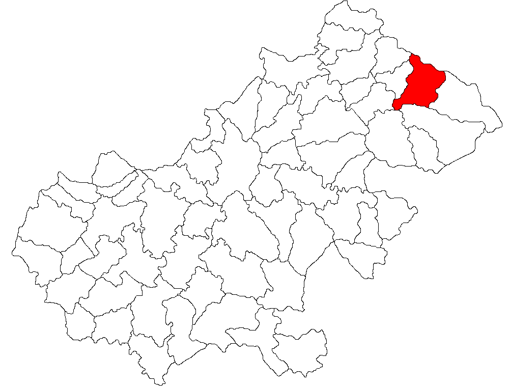 Categorie:Hărţi ale judeţului Satu Mare